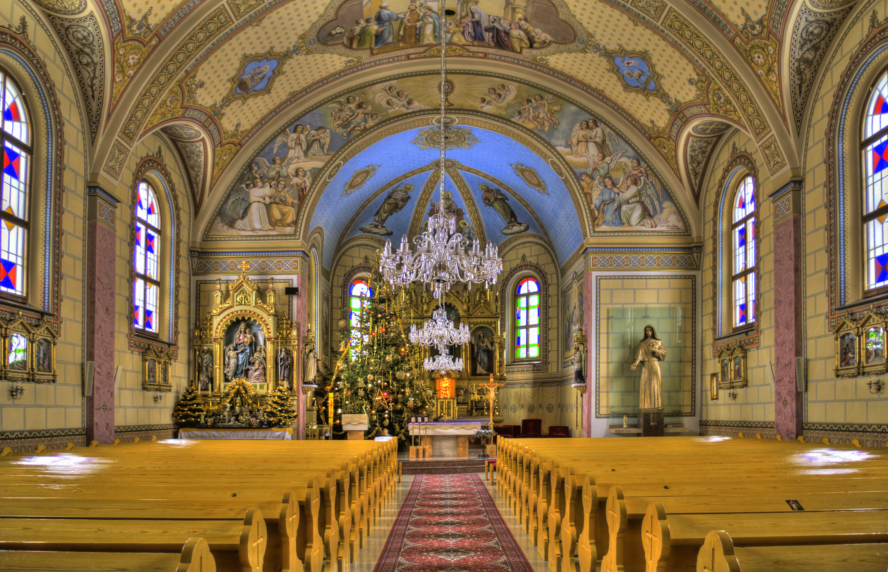 Interiér kostola v Krivej